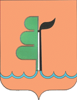 Герб Уварово (1989), Тамбовская область